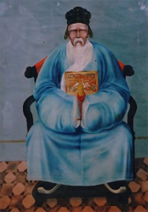 Tranh vẽ chân dung Tổng đốc Bình Phú Thân Văn Nhiếp (1804 - 1872) trong bổ phục Văn Công